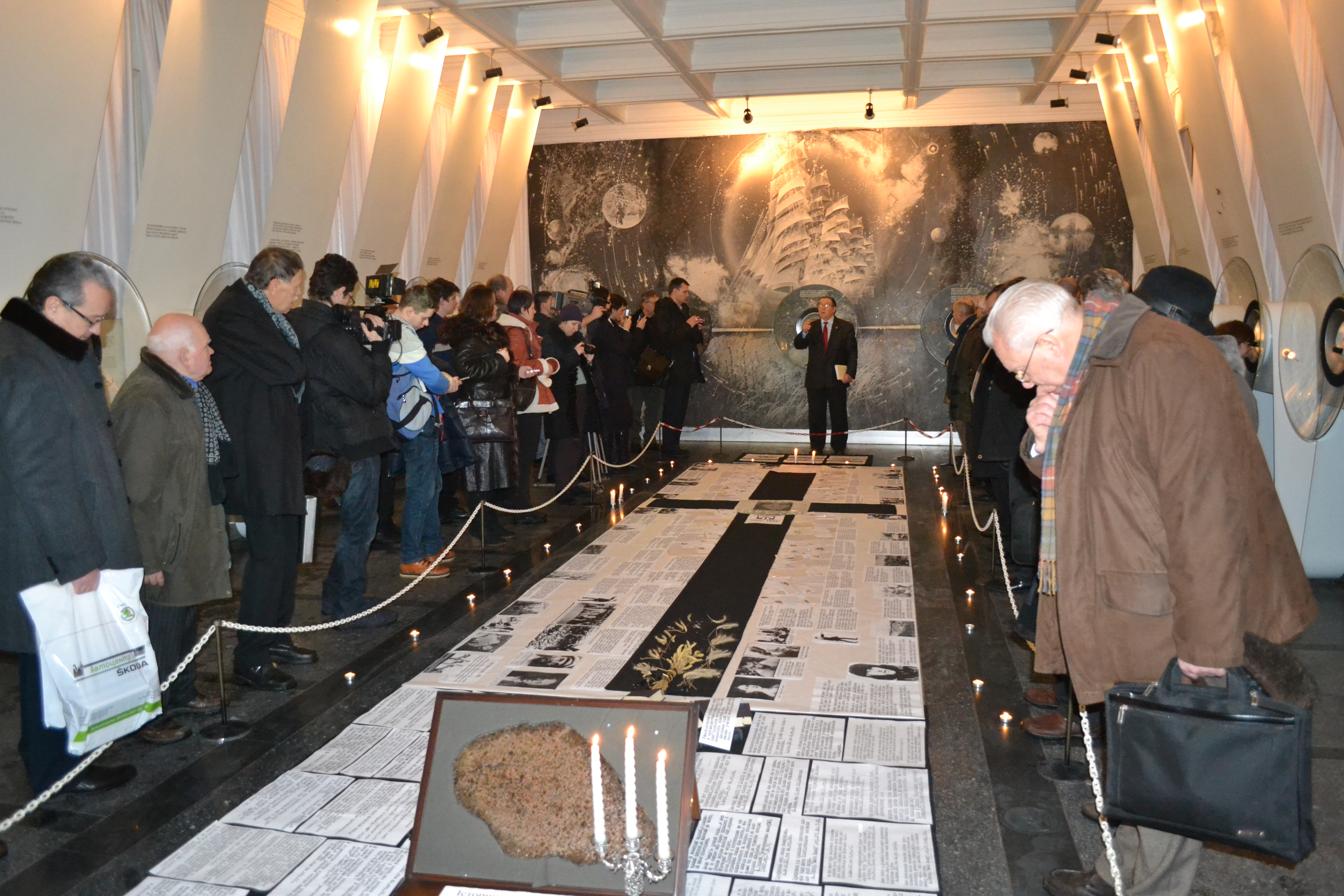 Відкриття виставки Миколи Сядристого в приміщенні його музею мікромініатюр